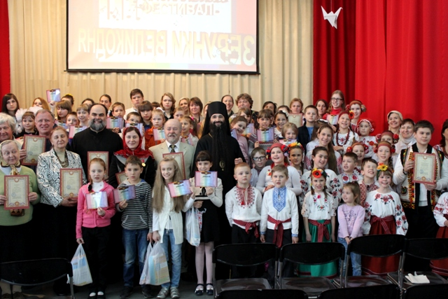 Духовно-просветительский центр Воскресенского Кафедрального собора УПЦ.Галерея "Соборная"